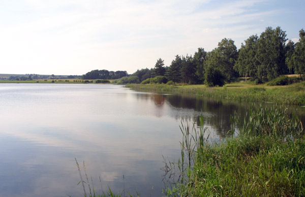 Olšanský rybník od hráze.